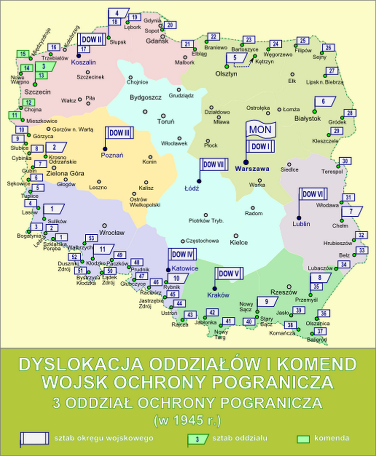 Dyslokacja oddziałów i komend Wojsk Ochrony Pogranicza - 3 Oddz. Ochrony Pogranicza w 1945 r.